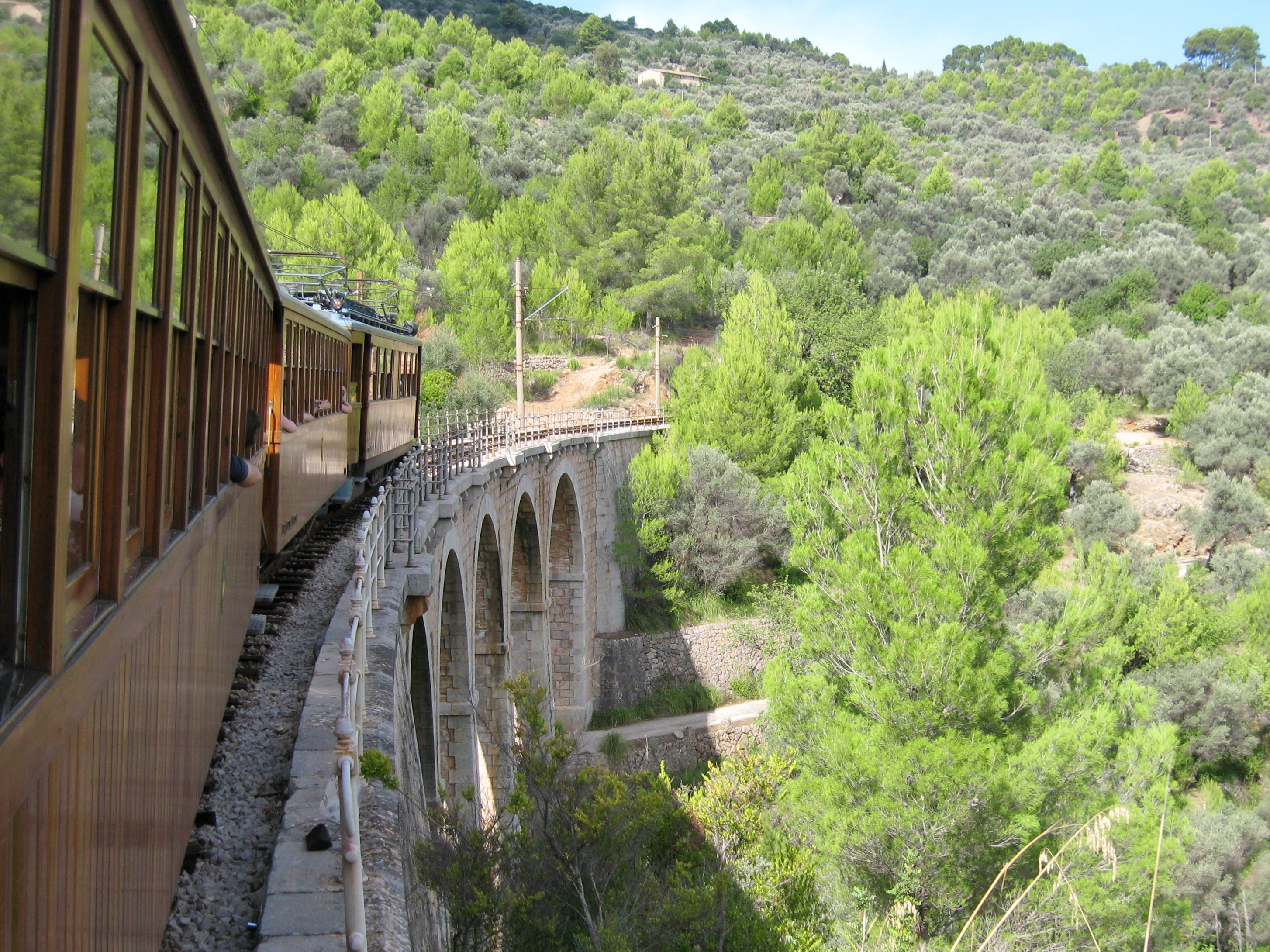 Viadukt Cinc Ponts der Eisenbahnlinie Palma - Sóller, Mallorca, Spanien